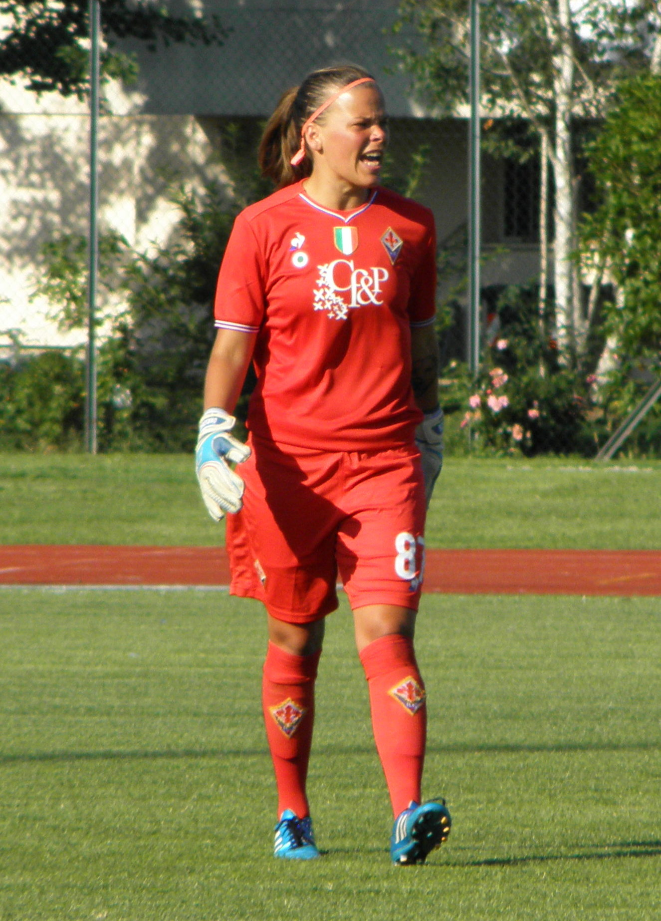 Abano Terme, Stadio delle Terme: 16 giugno 2018, spareggio UEFA Women's Champions League. Stéphanie Öhrström, portiere della Fiorentina.